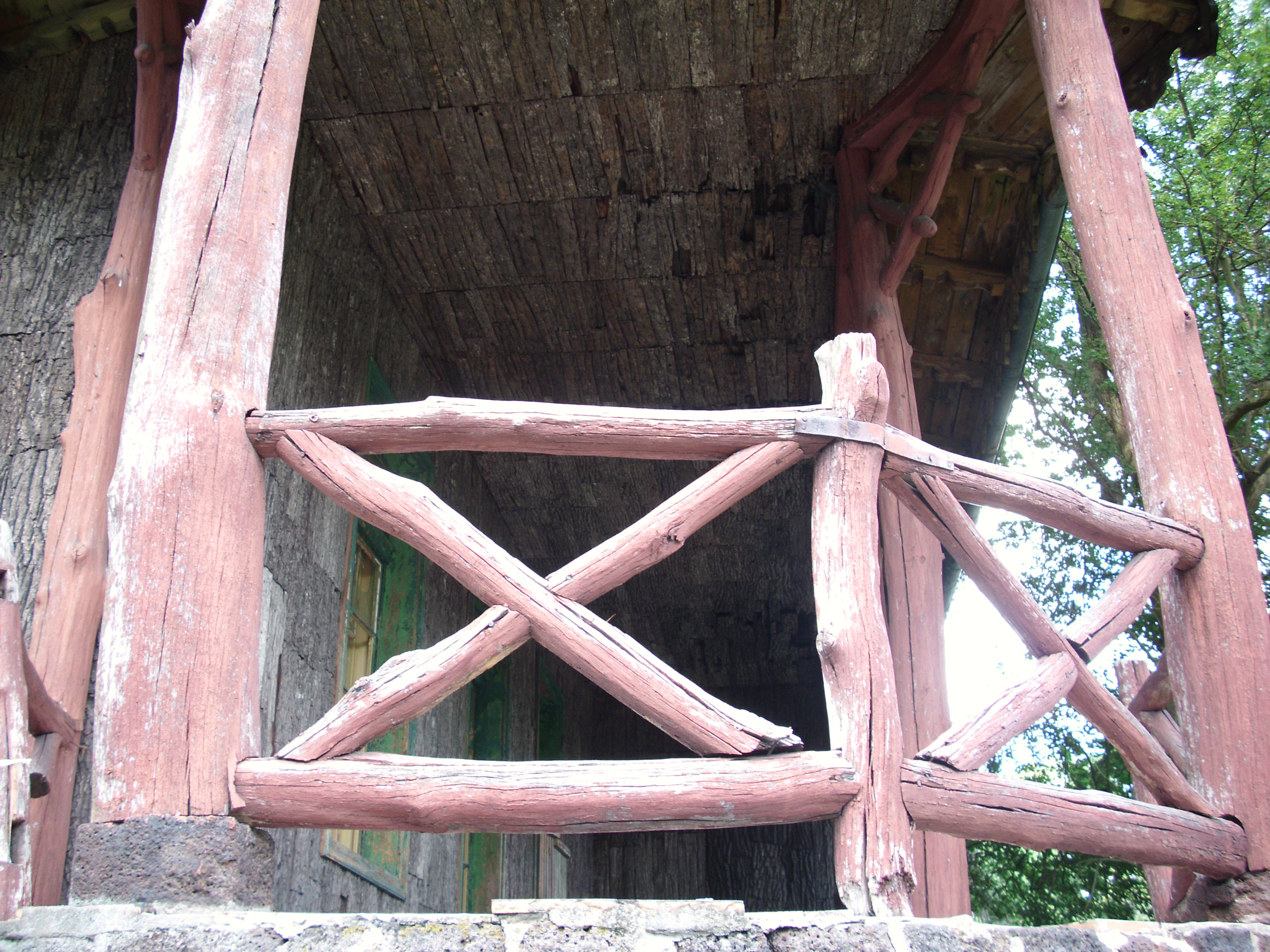 Moja Wola - pałacyk, balustrada balkonu